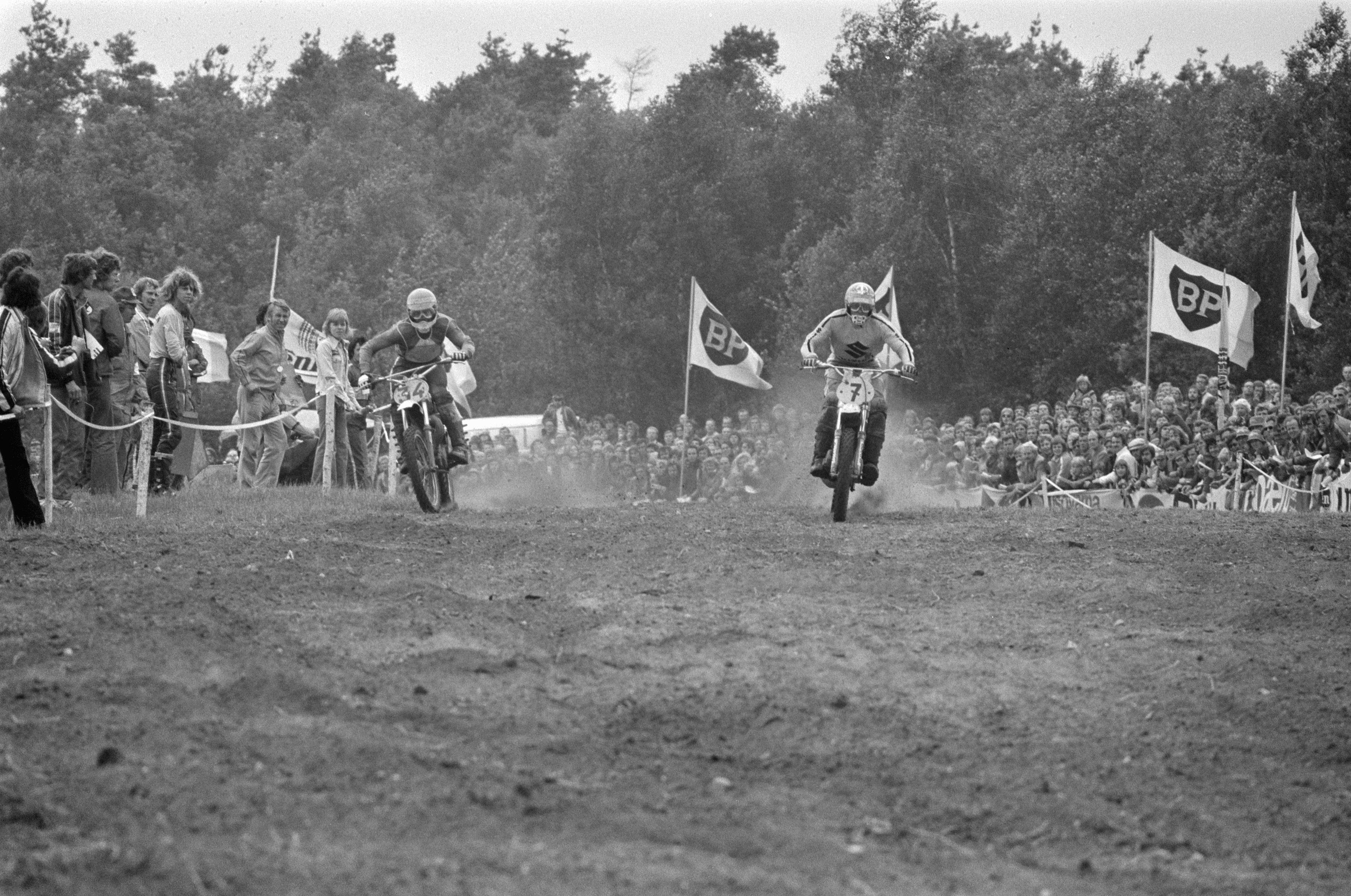 Collectie / Archief : Fotocollectie Anefo Reportage / Serie : [ onbekend ] Beschrijving : Motorcross van Markelo; de Nederlandse Gerrit Wolsink in actie Datum : 28 juli 1974 Trefwoorden : MOTORCROSS Persoonsnaam : Gerrit Wolsink Fotograaf : Peters, Hans / Anefo Auteursrechthebbende : Nationaal Archief Materiaalsoort : Negatief (zwart/wit) Nummer archiefinventaris : bekijk toegang 2.24.01.05 Bestanddeelnummer : 927-3562